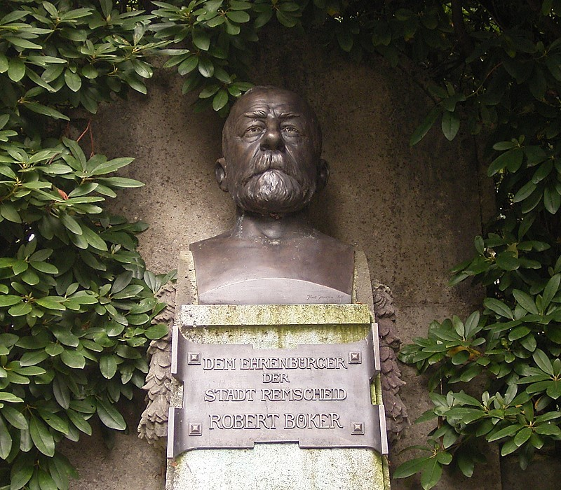 Eschbachtalsperre